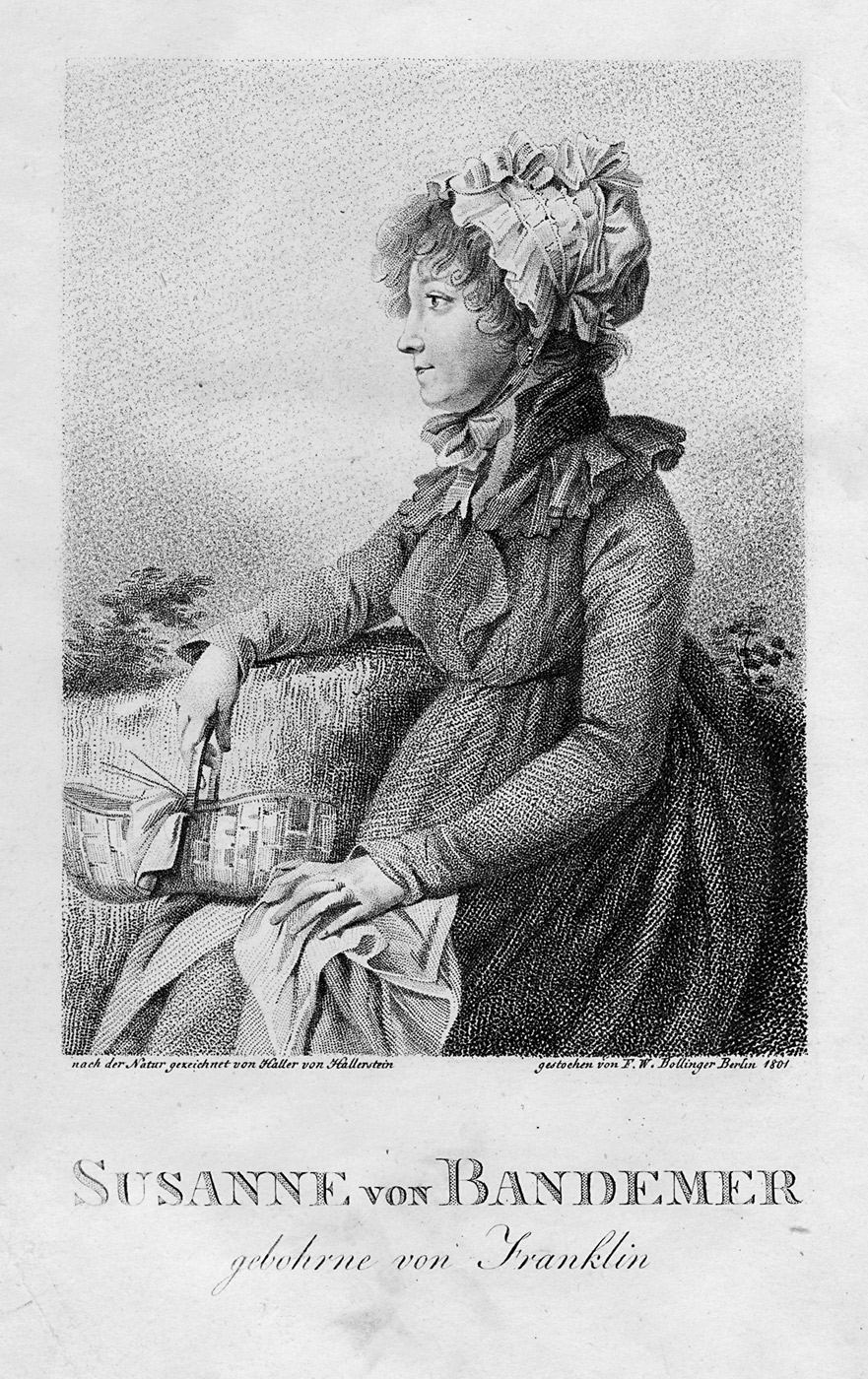 Porträt-Frontispiz aus: Susanne von Bandemer: Neue vermischte Gedichte. Berlin 1802.